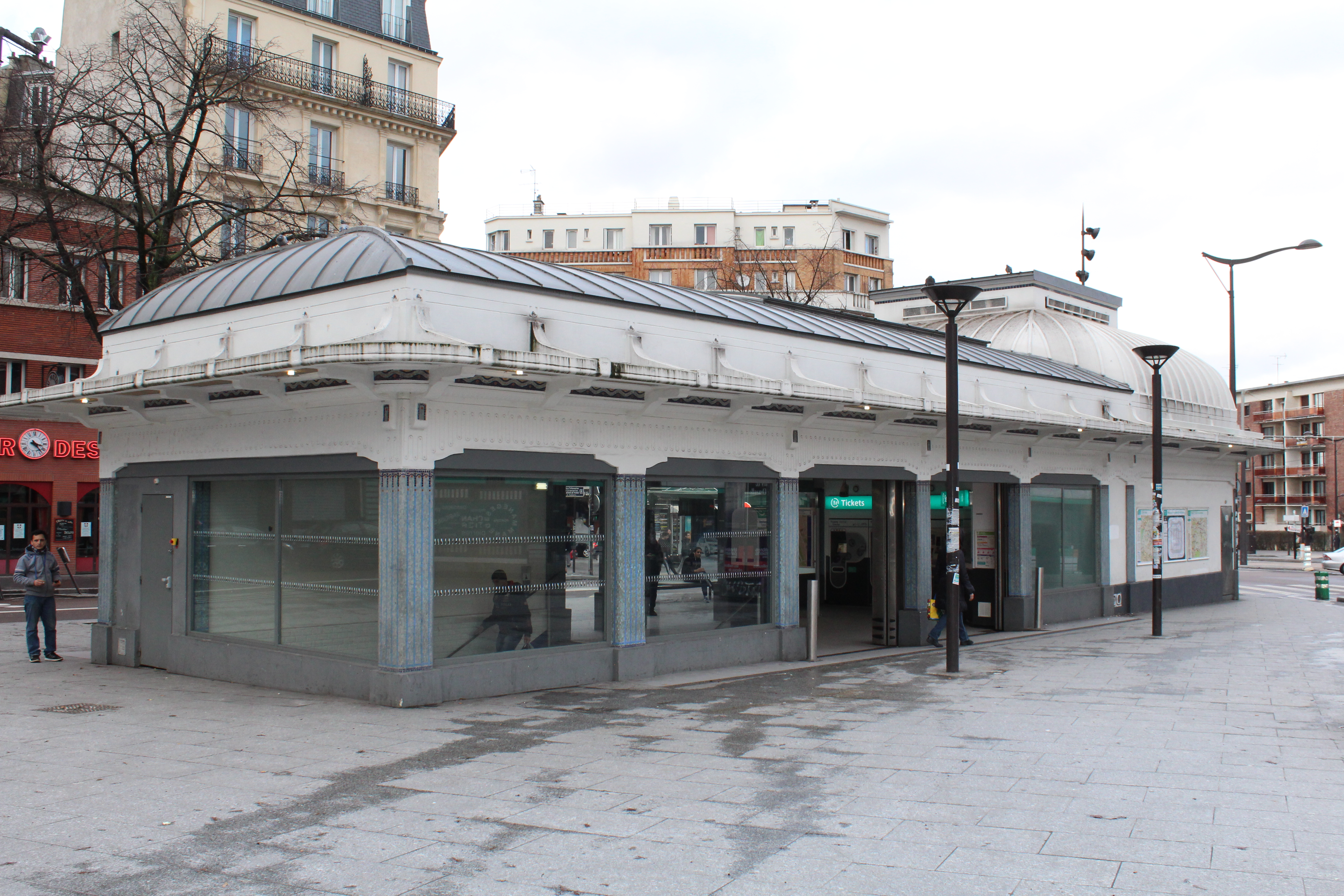 Bâtiment à d'entrée de la station de métro Porte des Lilas à Paris.